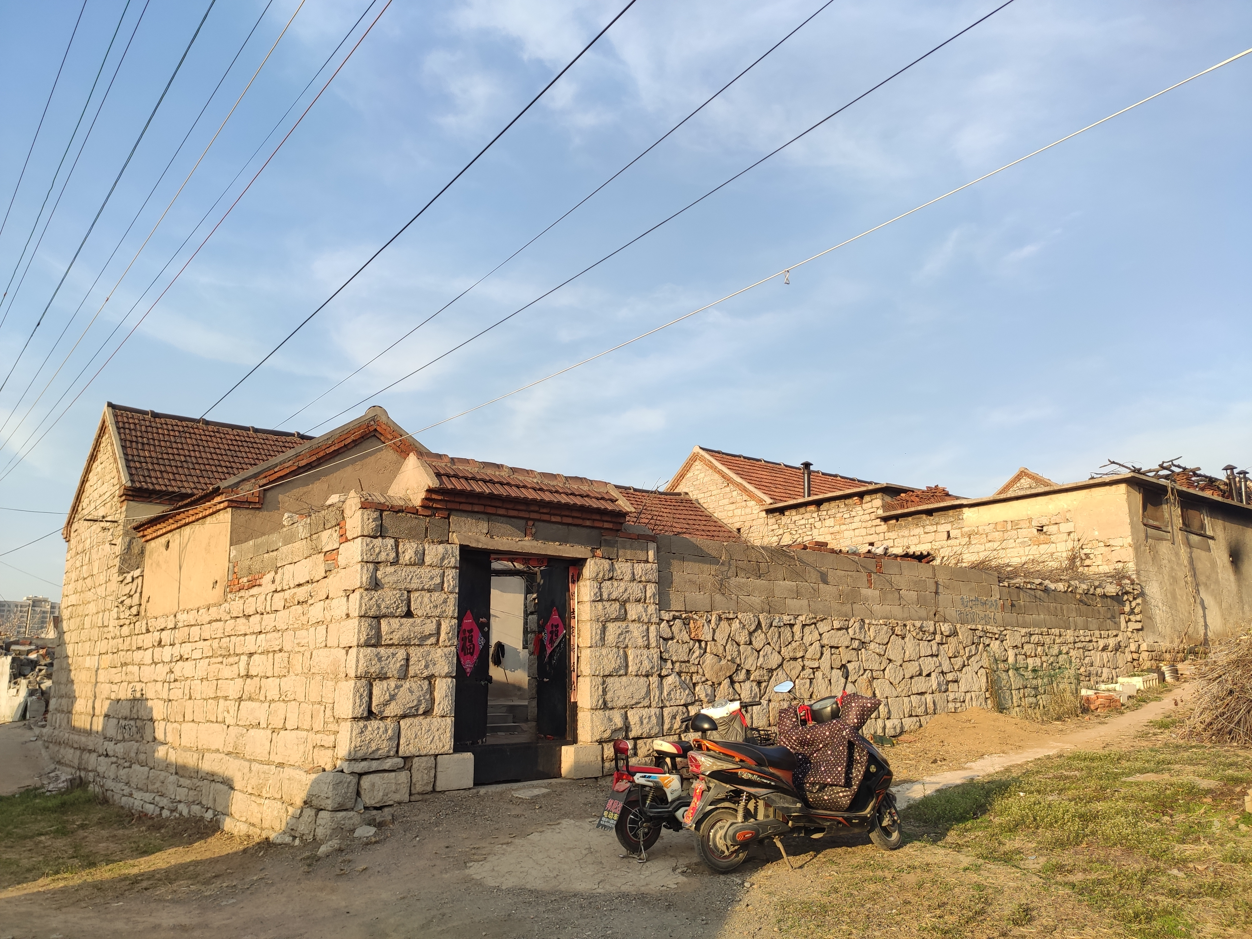 钢城区传统民居，就地取材使用石头建造